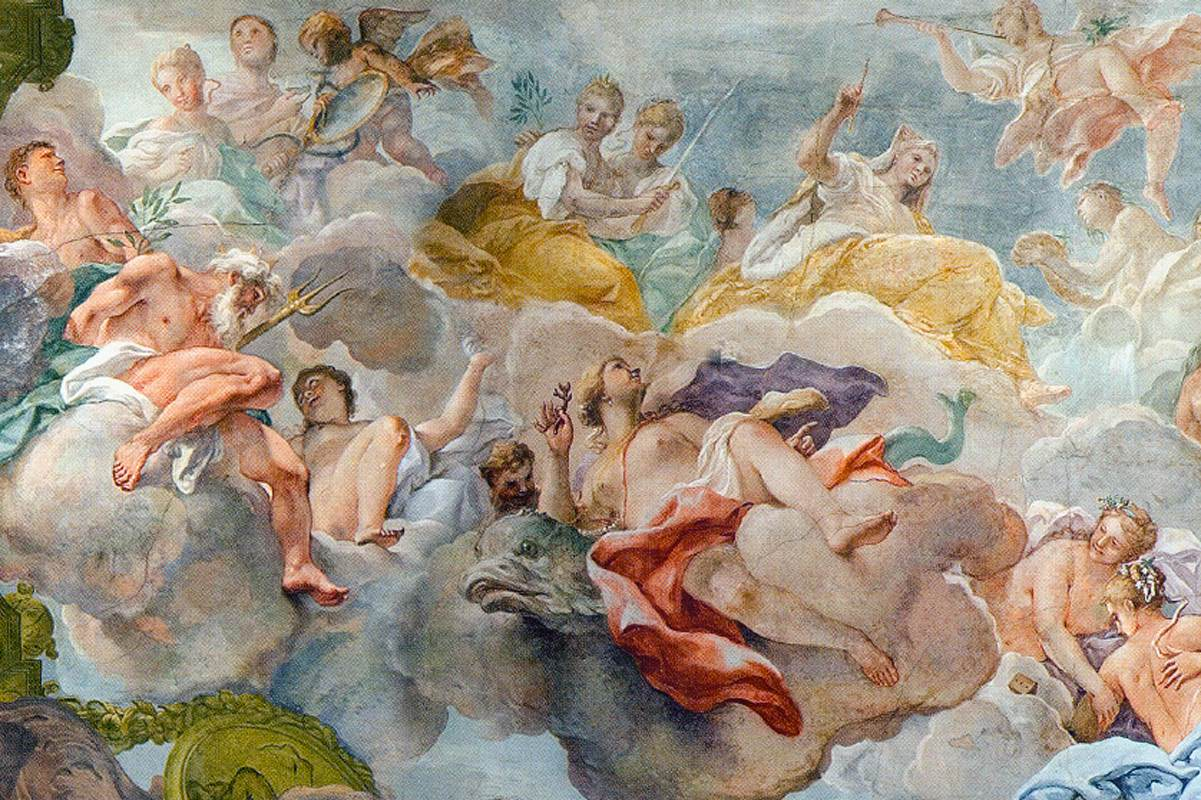 Soffitto del salone di Ca' Dolfin, Venezia. Particolare centrale con la Fama, Venezia, la Pace, la Giustizia, la Prudenza, Nettuno, Anfitrite (sostenuta dal delfino simbolo dei Dolfin, e le Grazie.